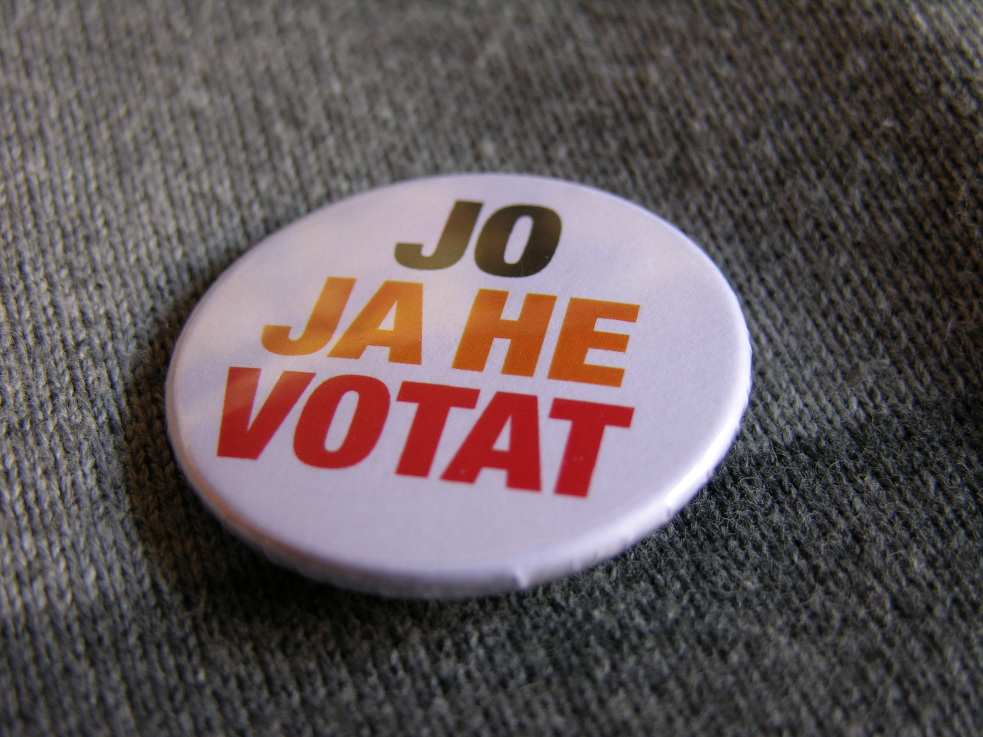 Xapa del 10A